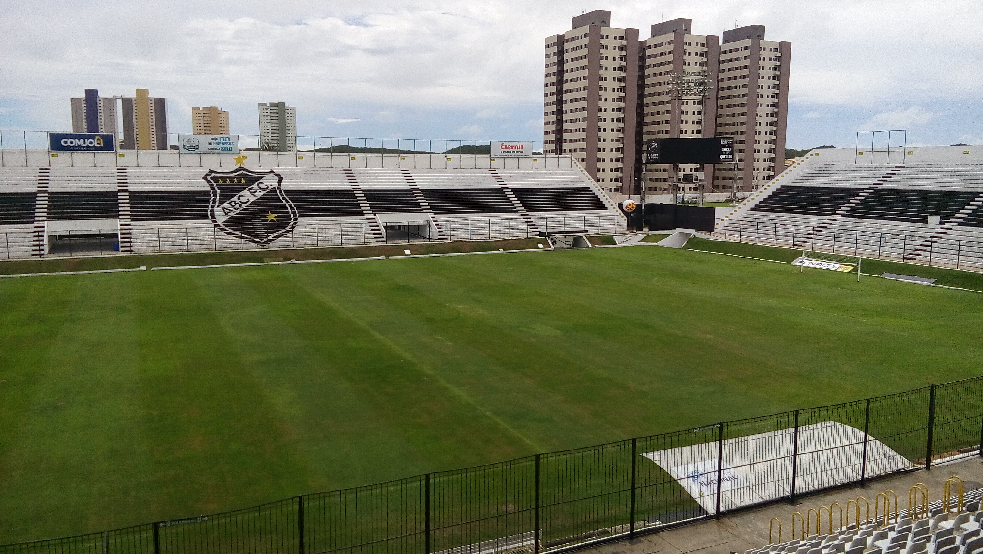 Estádio Maria Lamas Farache